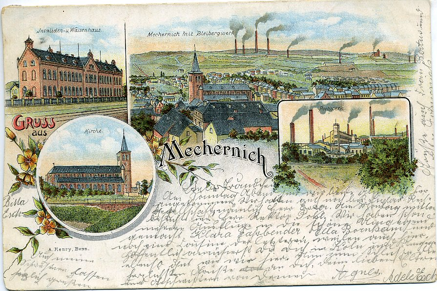 Invaliden u Waisenhaus Bleibergwerk Kirche Pochwerk